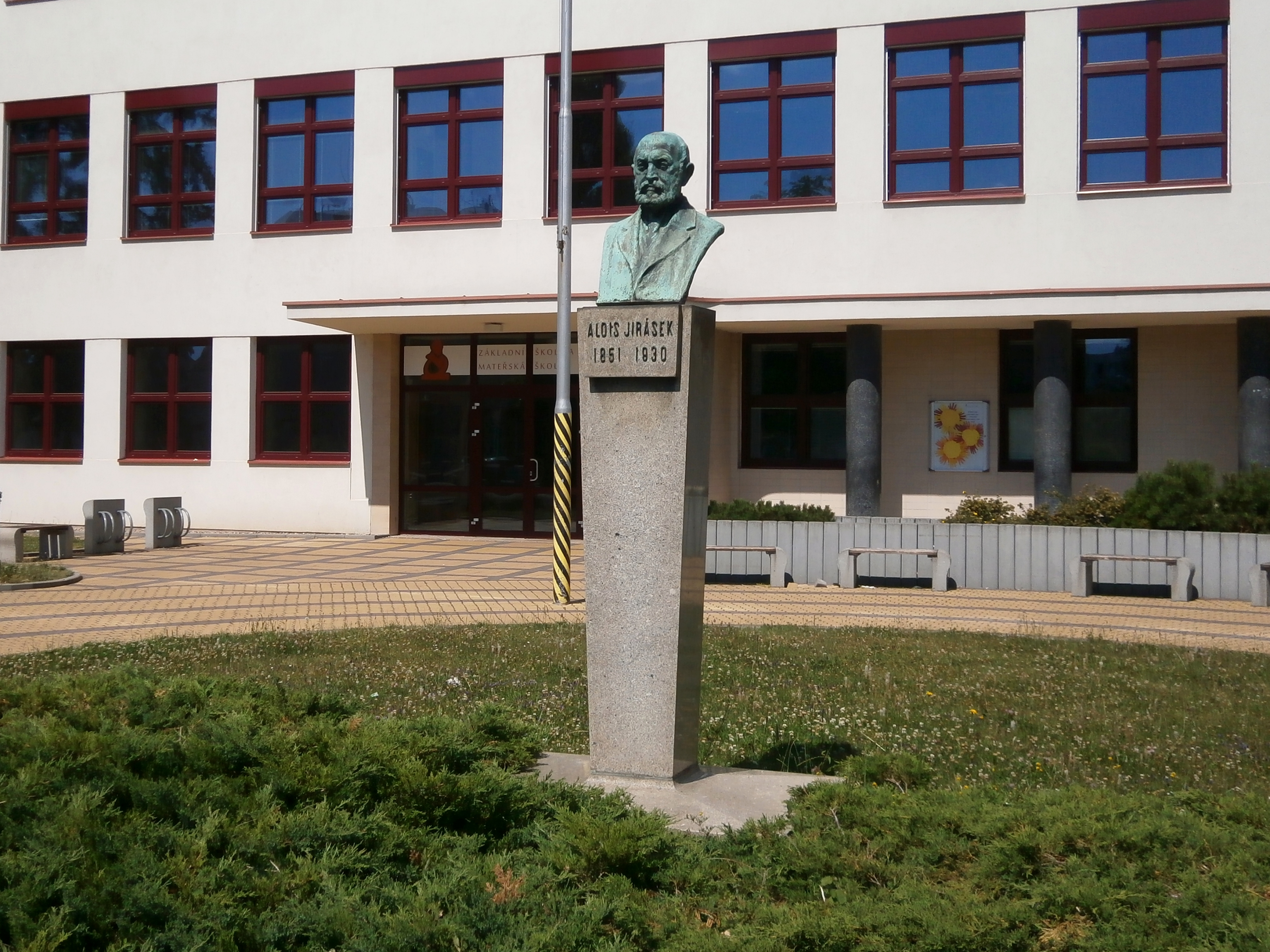 Pomník A. Jiráska u ZŠ Jiráskovo náměstí (Hradec Králové)